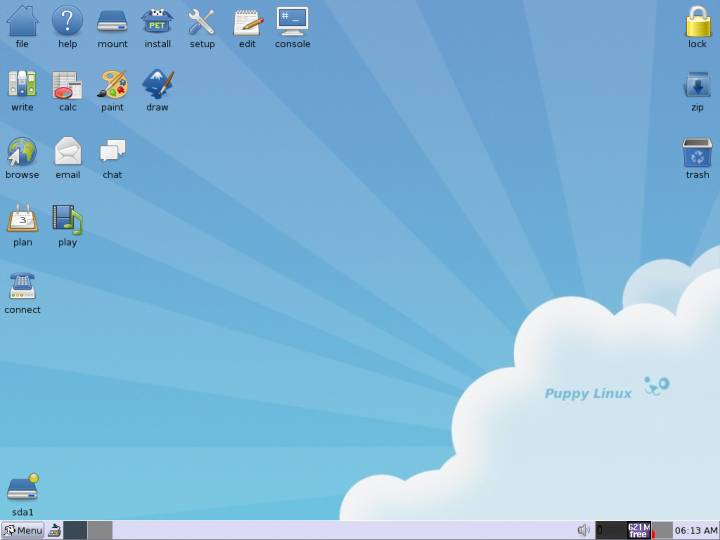 Puppy_linux_430